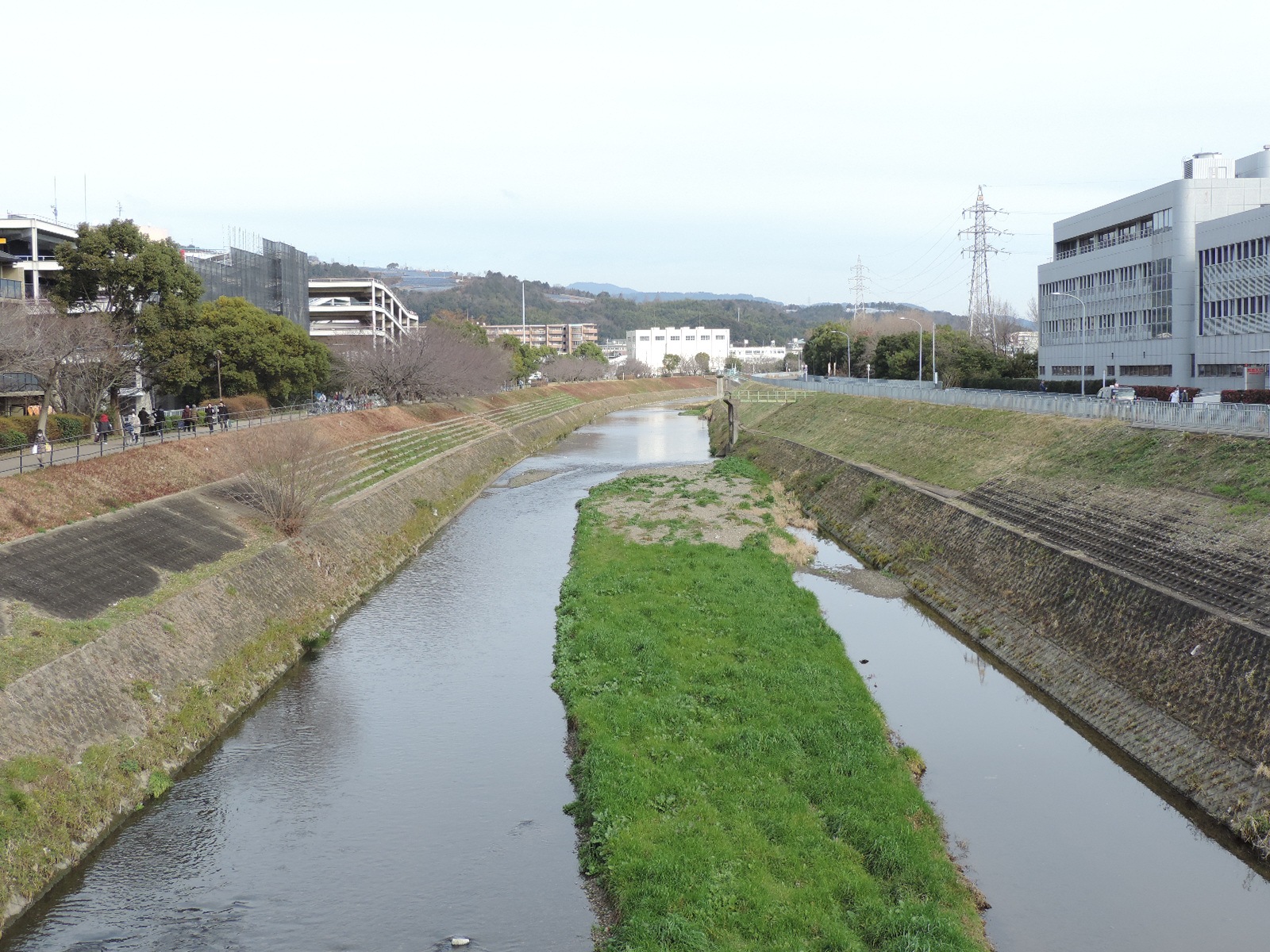 新六地蔵橋から望む山科川